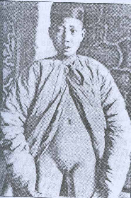 Hình do người truyền lên chụp từ Tạp chí nghiên cứu và phát triển số 3.(51).2005. Ảnh miêu tả: Thái giám đời Thanh, Trung quốc.